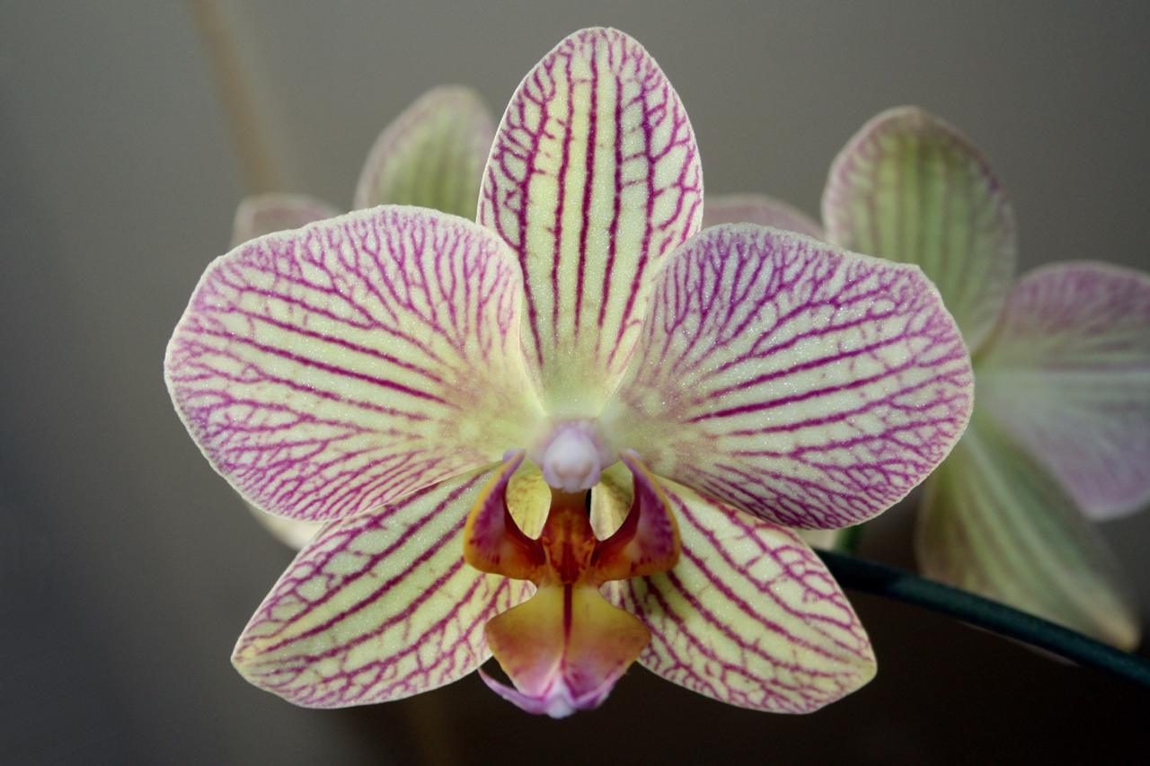 Orchidée